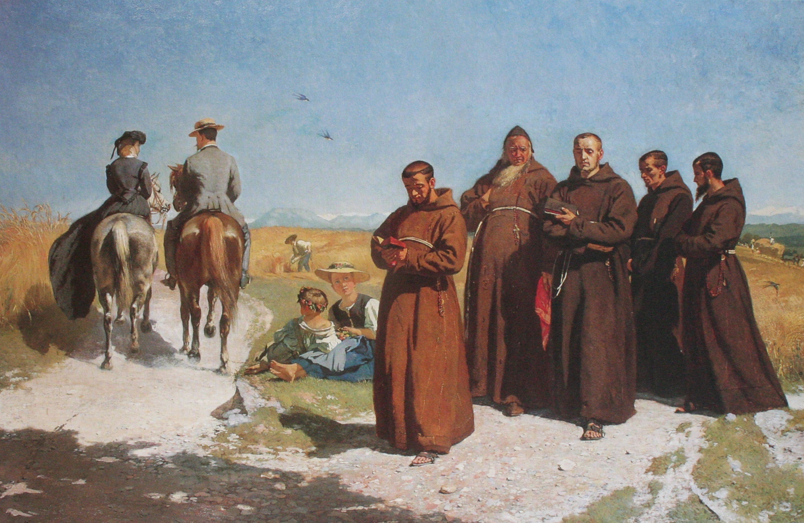 Askese_und_Lebenslustt, Gemälde von Frank Buchser, 1865, 102 x 153 cm, Öffentliche Kunstsammlung Basel, Kunstmuseum